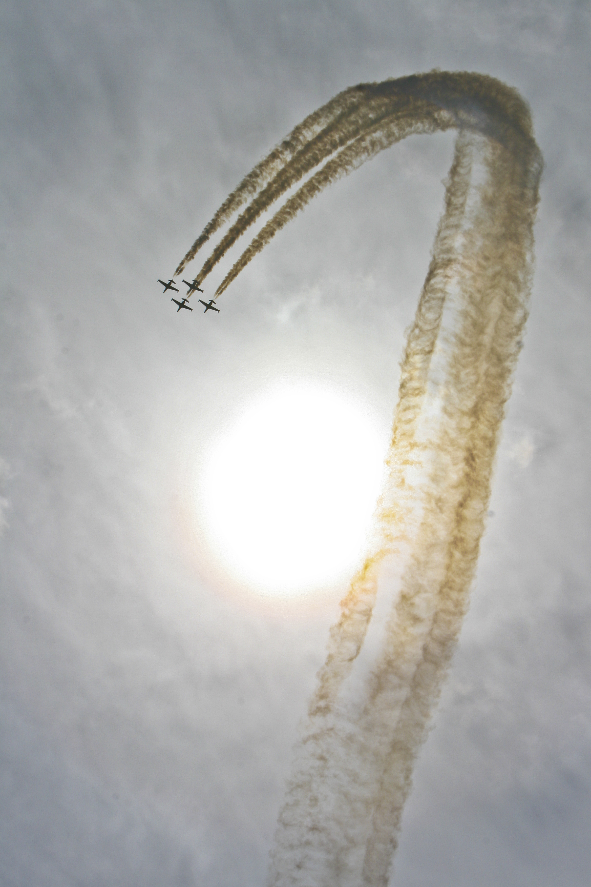 מפגן חיל האוויר יום העצמאות ה-60 למדינת ישראל